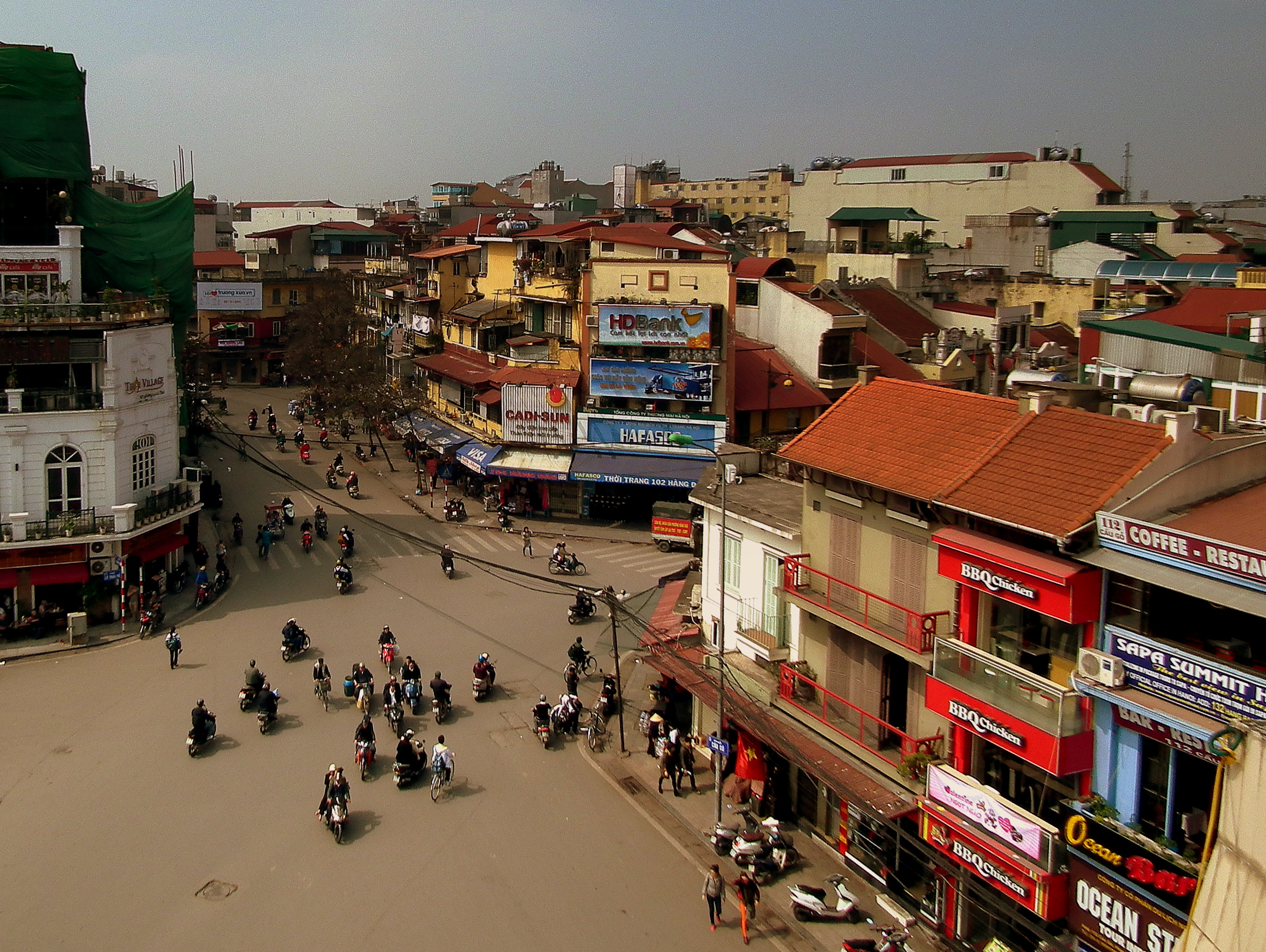 HOAN KIEN LAKE DISTRICT HANOI VIETNAM FEB 2012